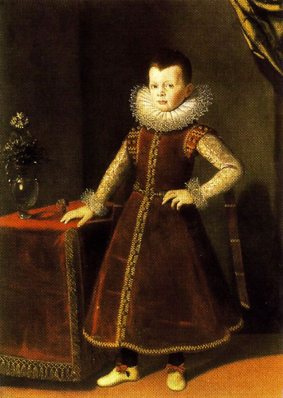 Retrato de Francisco Fernando de Medicis